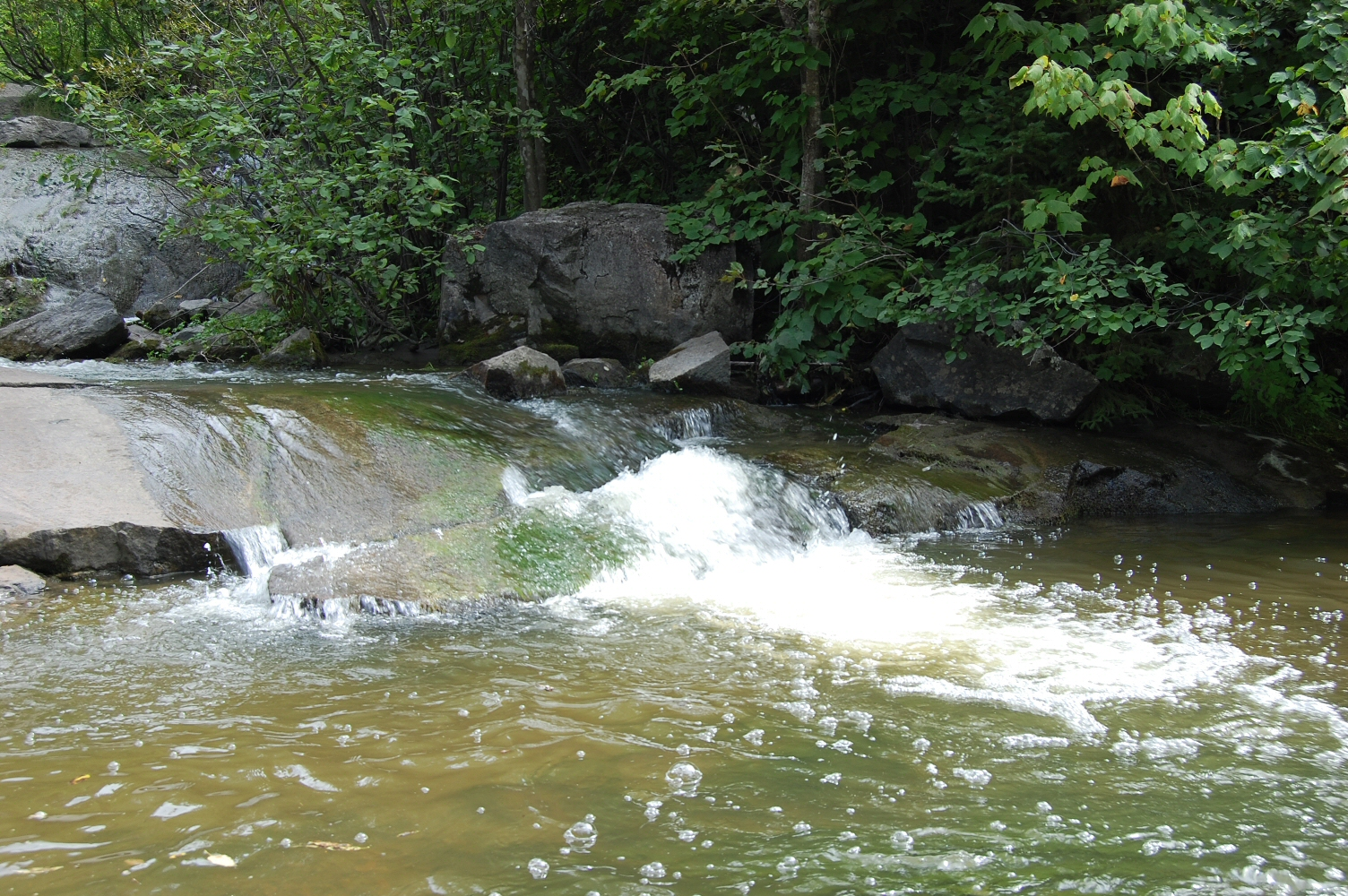 La rivière aux Rats dans le parc Rosaire-Gauthier, Chicoutimi, Québec